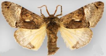 Charadra oligarchia male